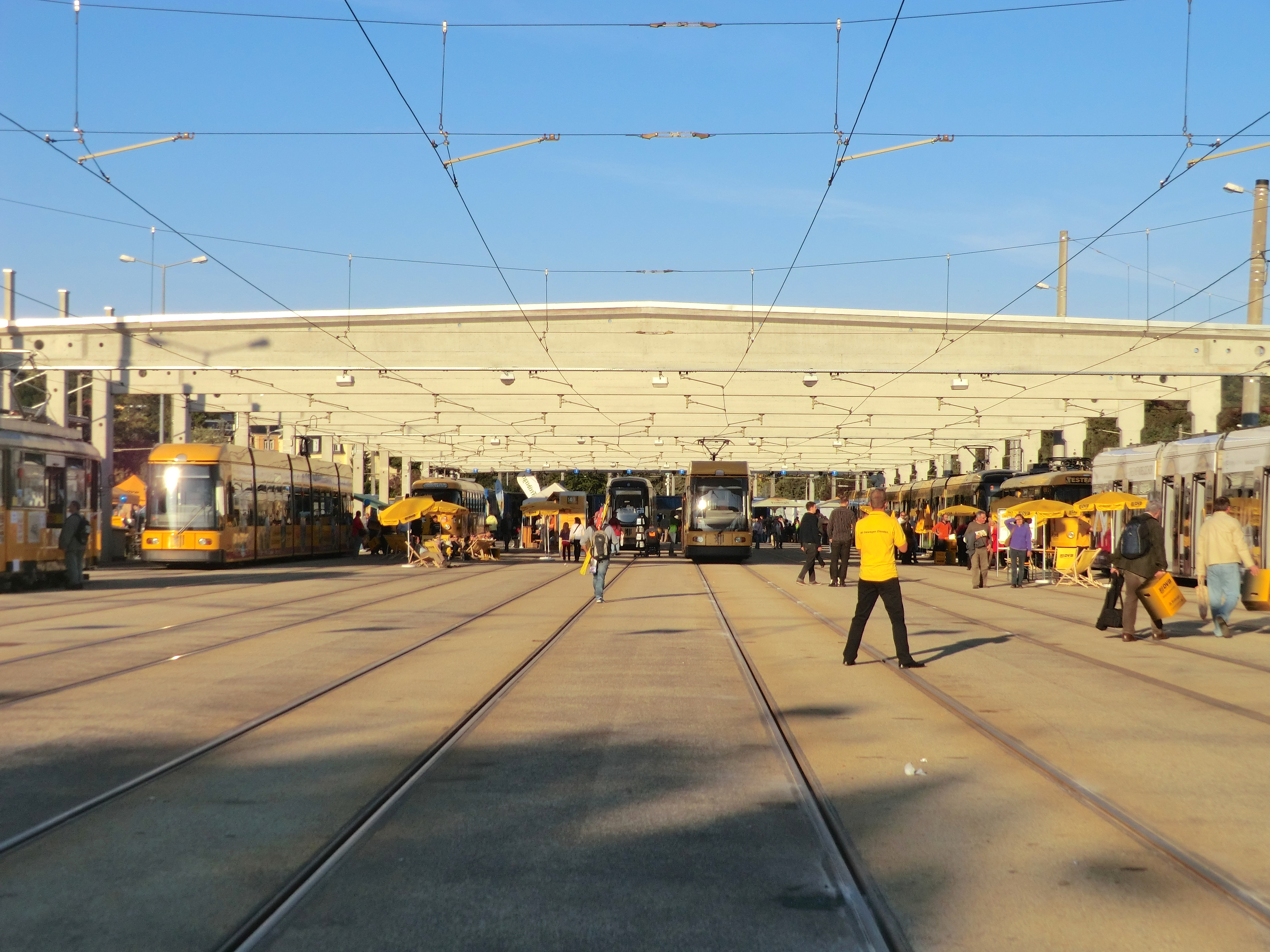 Straßenbahn-Betriebshof Trachenberge Dresden zu "140 Jahre Straßenbahn in Dresden"